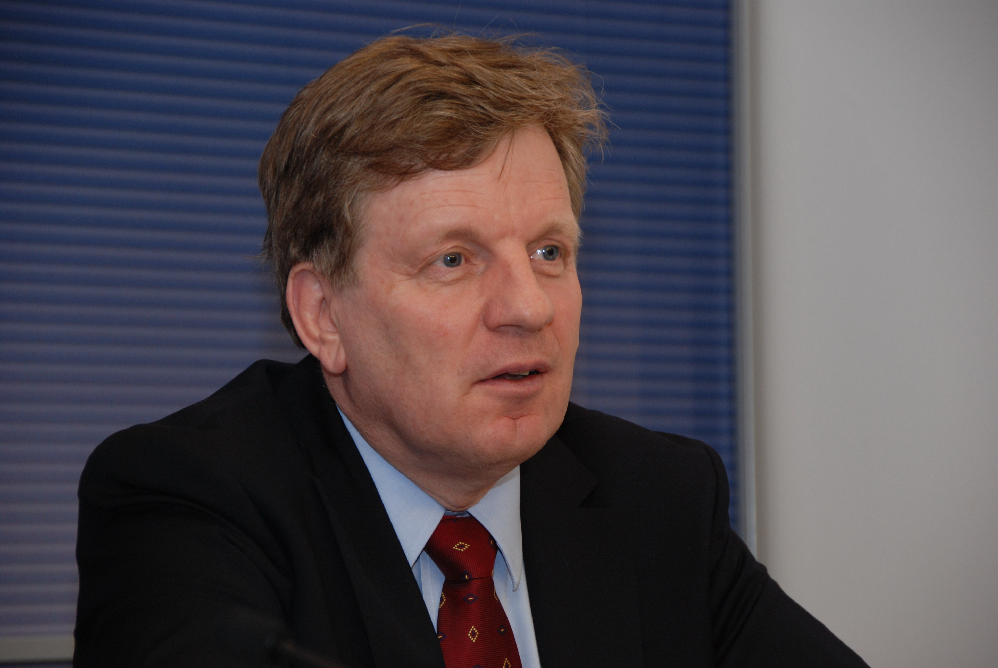 Nokia viceprezidents, bijušais Somijas premjerministrs Esko Tapani Aho Foto: Aivis Freidenfelds, Valsts kanceleja